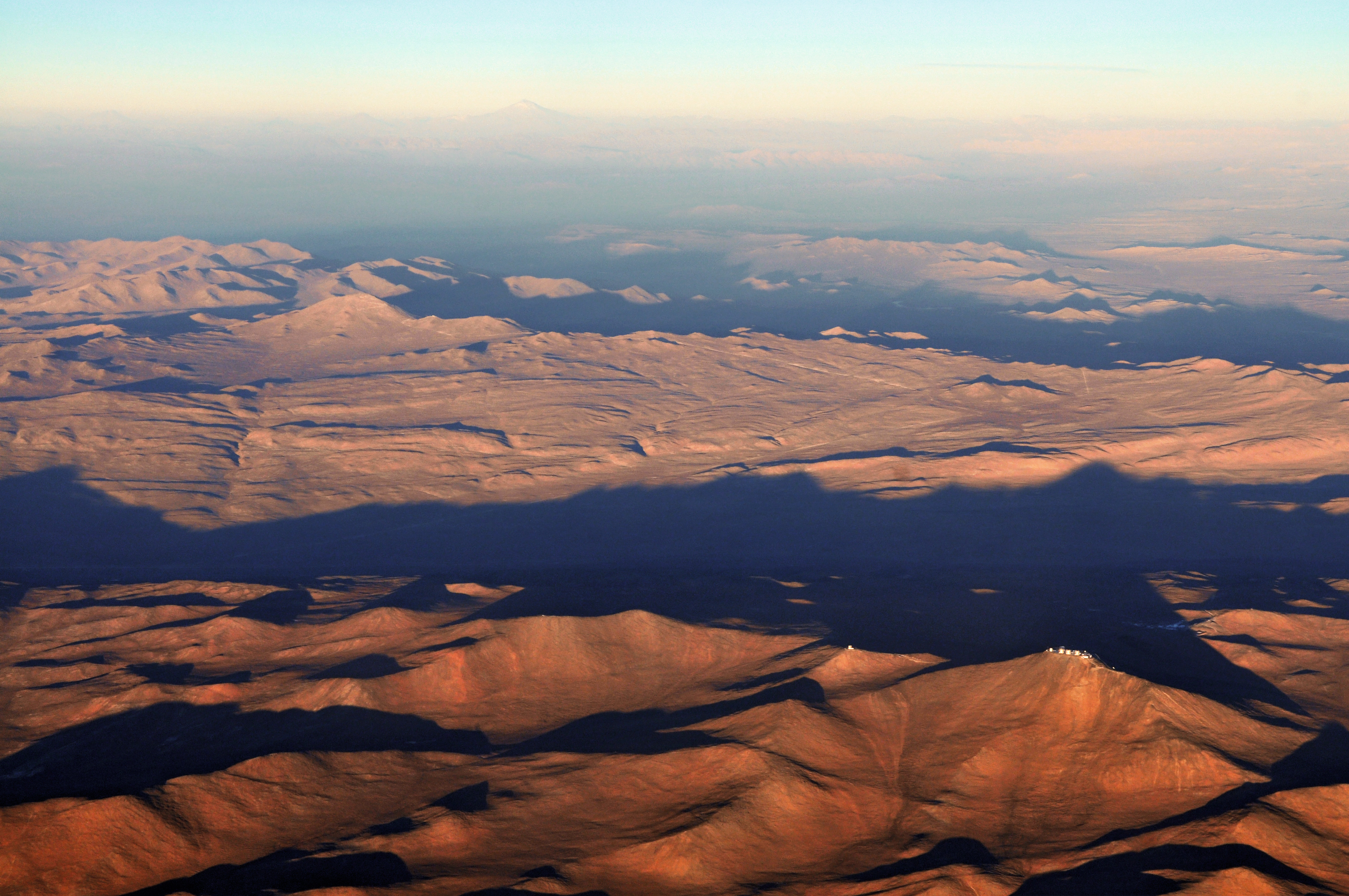 Panorama sur le Cerro Paranal (VLT) et le Cerro Armazones (EELT). Le Cerro Paranal est visible en bas à droite ; à gauche, le télescope VISTA. Le Cerro Armazones, où sera construit l'EELT, est un pic visible au milieu sur la gauche. A l'arrière plan, le volcan Llullaillaco (6739 m).